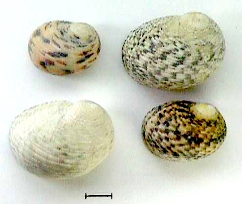 Nerita peloronta Linnaeus, 1758 colectadas en 1986 en Archipiélago Los Monjes, Dependencias Federales - Venezuela